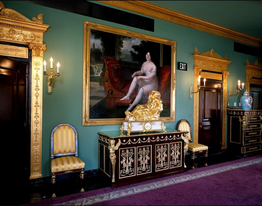 Portrait présumé de Pauline Bonaparte Borghese, par le peintre français Louis Benjamin Marie Devouge, 1770-1842, 19e siècle, huile sur toile, 72 x 82 ", SN426, Legs de John Ringling, 1936, Collection de John et Mabel Ringling Museum of Art, le State Art Museum de Floride, une division de la Florida State University